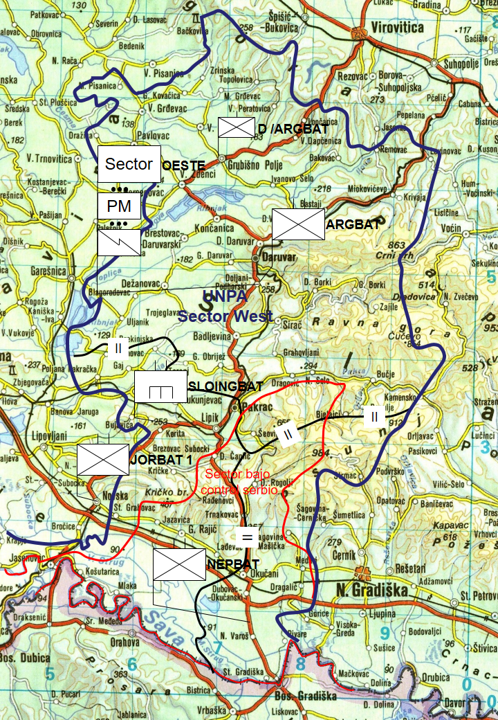 Confeccionado sobre la base de: Servicio Histórico del Ejército. El Ejército Argentino y las Operaciones de Mantenimiento de la Paz. UNPROFOR. Volumen V. Pag 52 y ss.